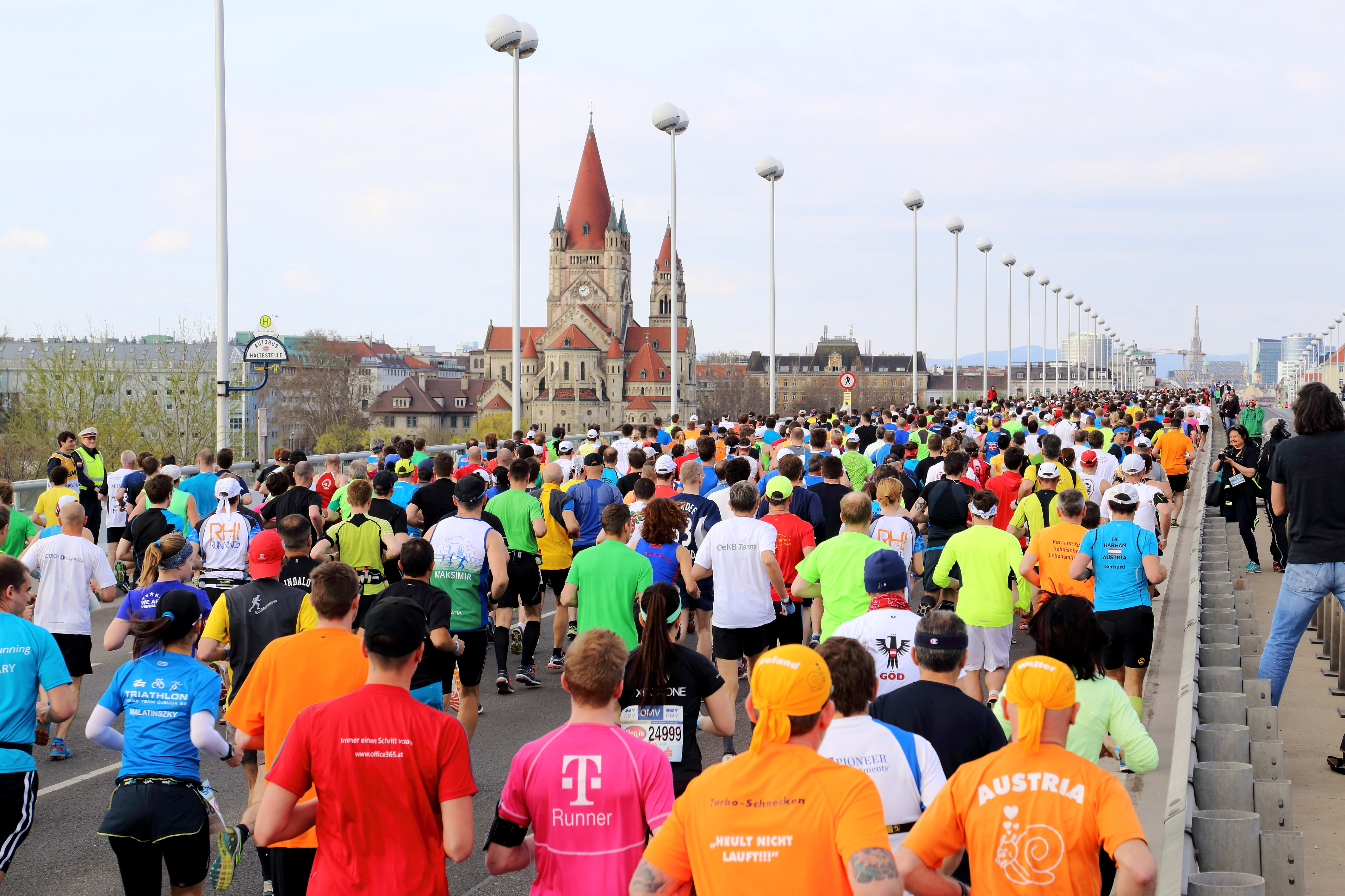 Läufer des 32. Vienna City Marathon im Bereich Reichsbrücke mit der Mexikokirche im Hintergrund. Insgesamt gab es 42.742 Anmeldungen aus 129 Nationen (Marathon 9.064, OMV Halbmarathon 16.145, Stadion Center Staffel Marathon 14.576 (=3.644 Teams), Coca-Cola 4.2 1.580, Coca-Cola 2.0 1.377). Sieger wurde der Äthiopier Sisay Lemma mit einer Zeit von 2:07:31 Stunden.